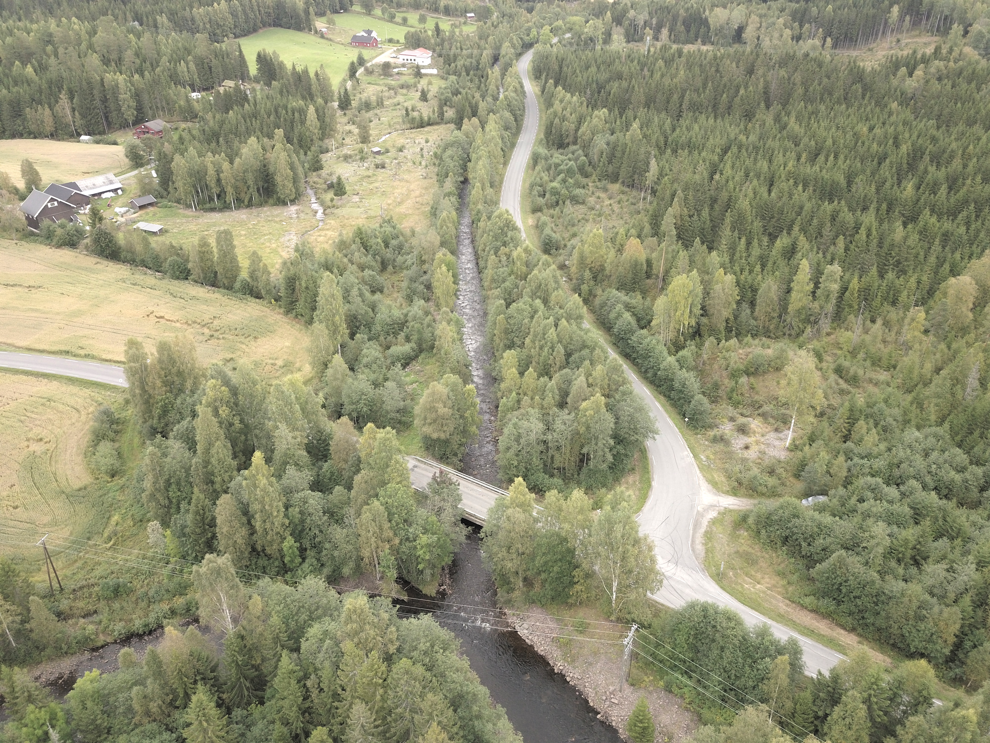 Steinsjøelva i Hurdal